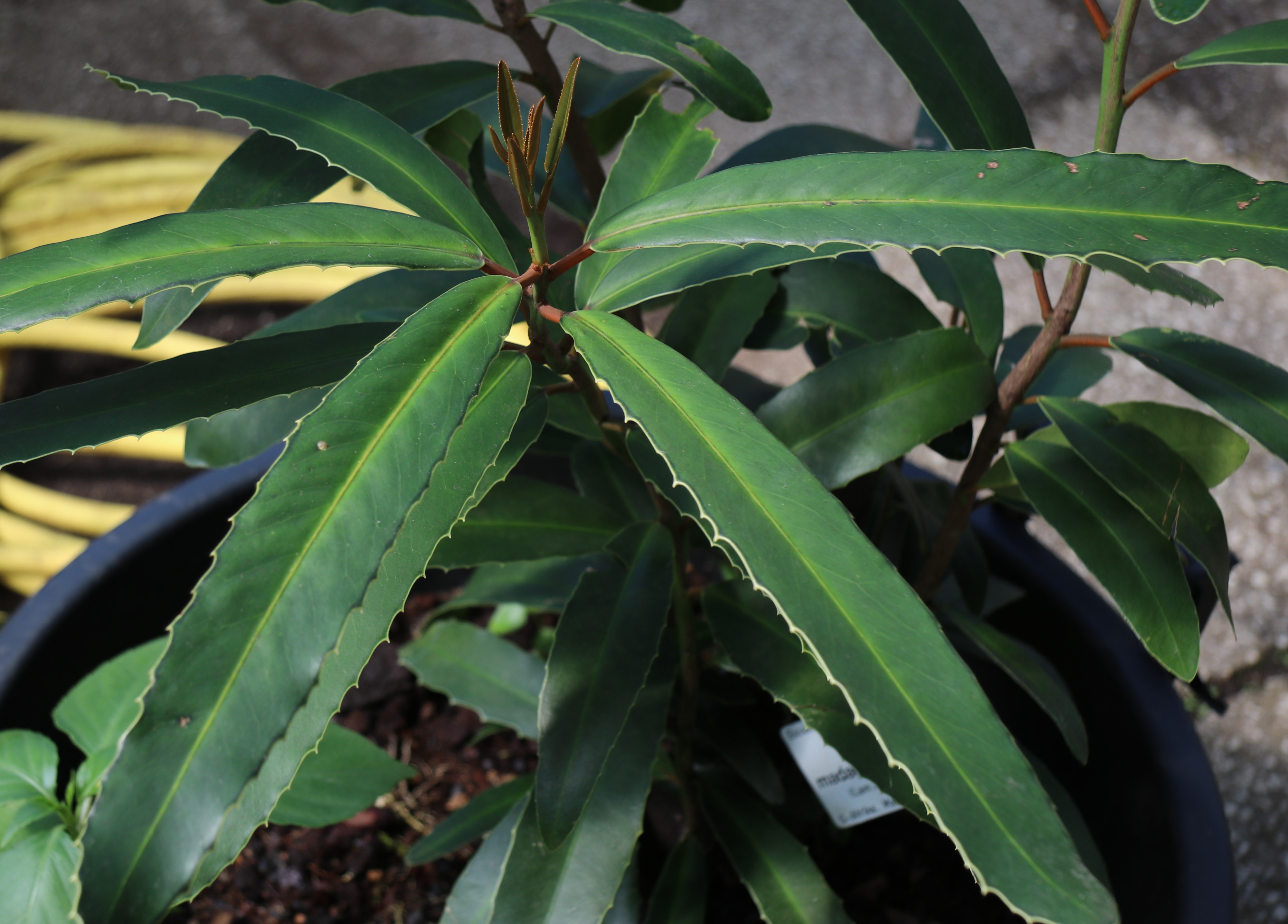 Brexia madagascariensis im Botanischen Garten Dresden